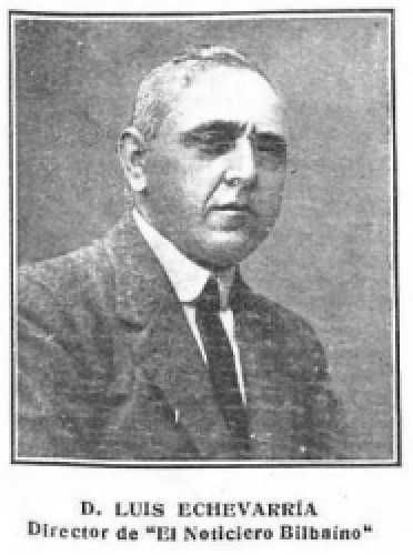 Luis Echevarria, director de Gaceta de El Noticiero Bilbaino